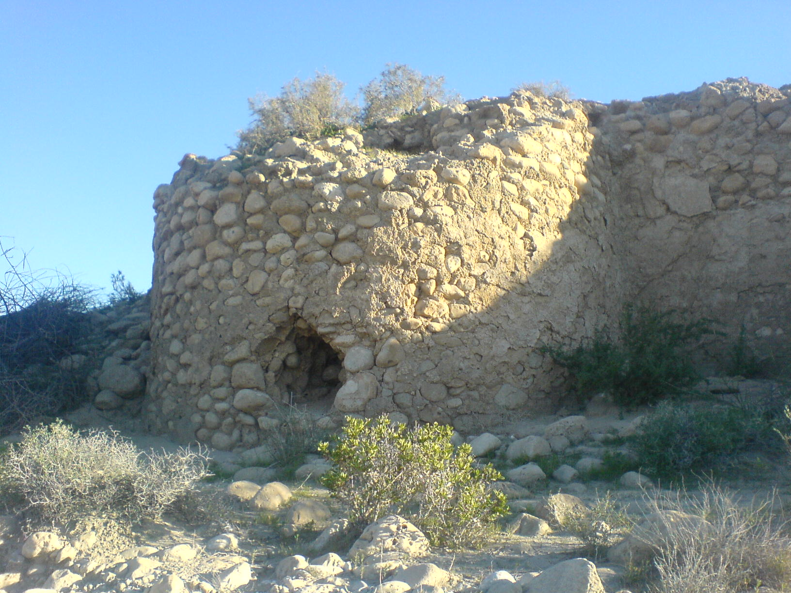 برج قلعه زندان